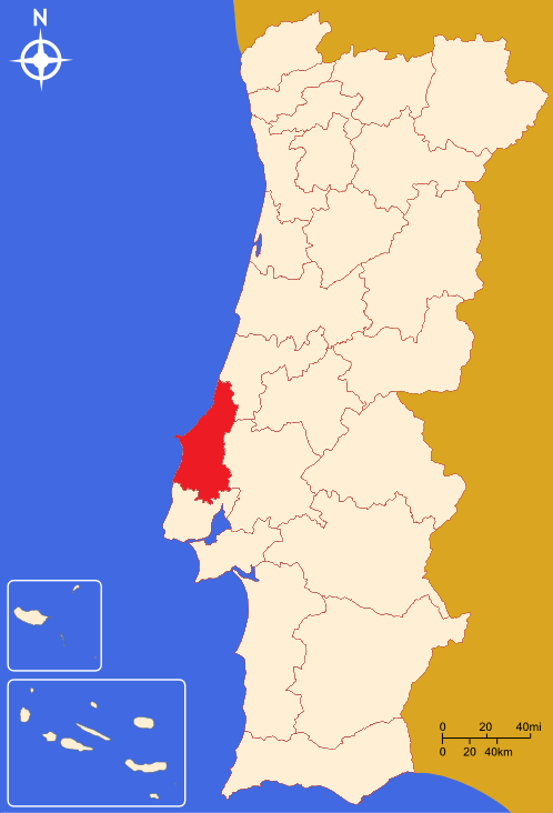 Comunidade Intermunicipal do Oeste